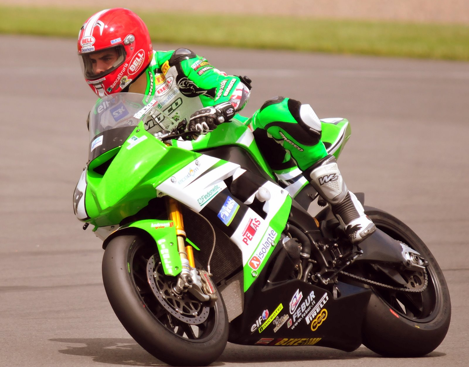 Luca Scassa sulla Kawasaki del Team Pedercini